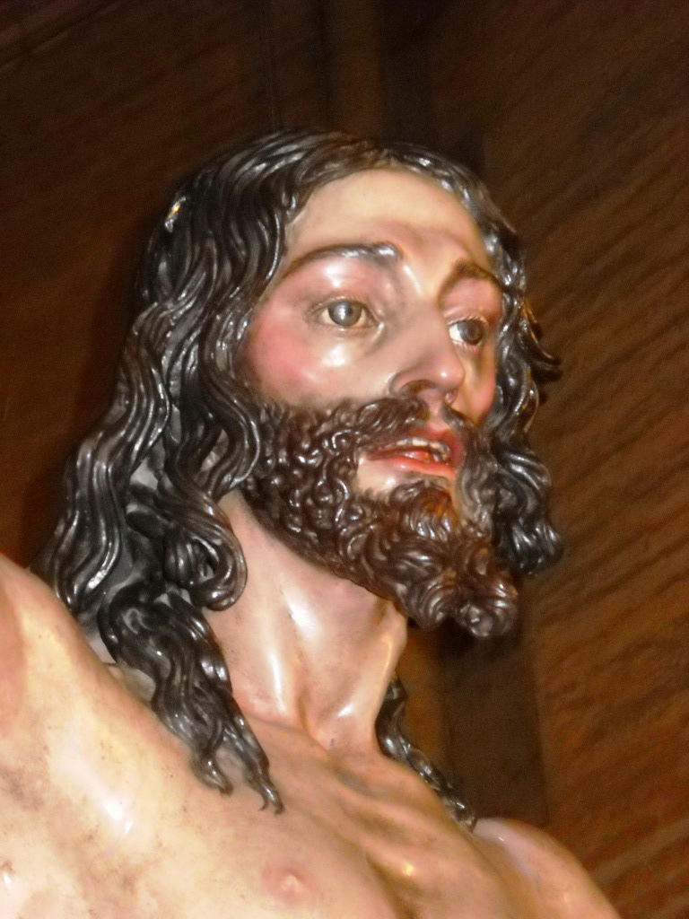 Esta es la obra magna del Imaginero Francisco Buiza. Procesiona por las calles de Sevilla en la madrugada del Domingo de Resurrección.